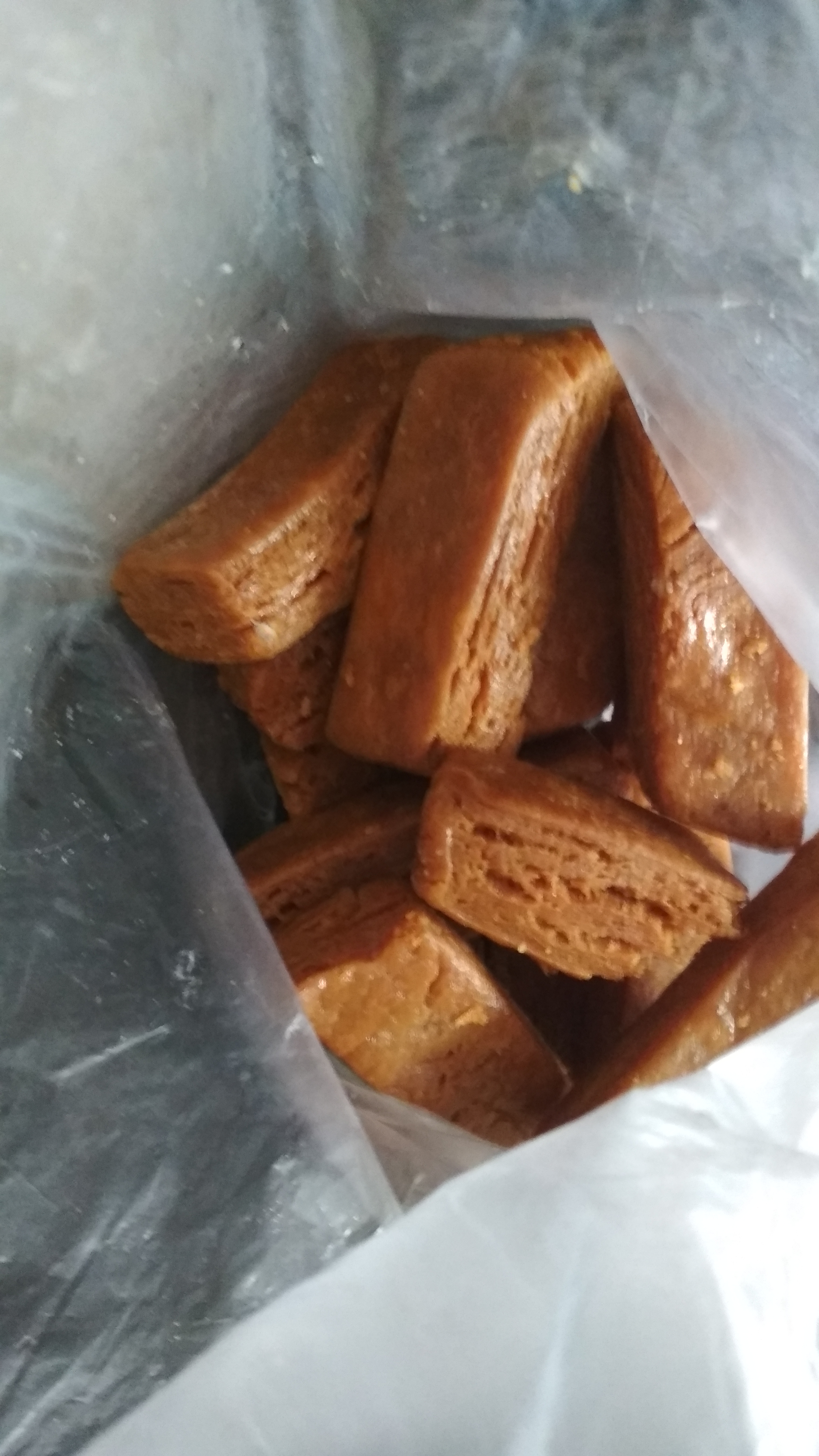 milk cake from kerala